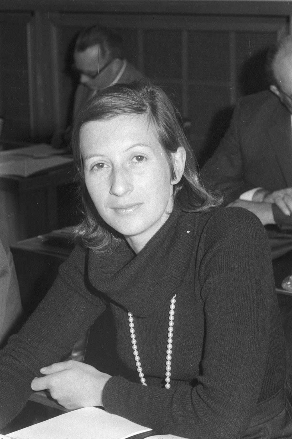 Die Diplomvolkswirtin wird in der Ratsversammlung vom November nachträglich vereidigt, da sie bis jetzt mit ihrem Mann in Japan wohnte und ihr Mandat nicht gleich nach der Kommunalwahl 1970 antreten konnte.